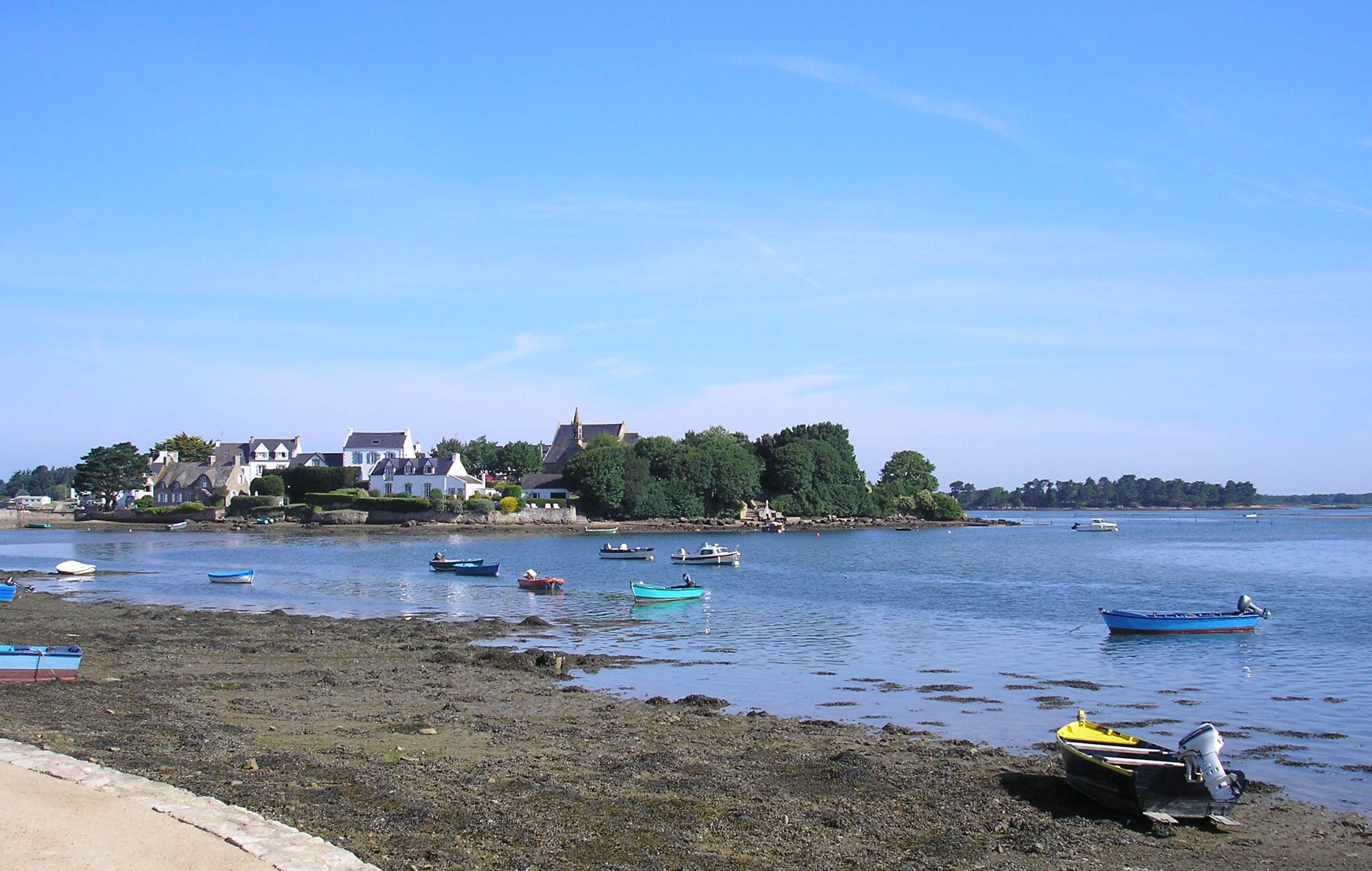 Belz (Bretagne, France). L'île de Saint-Cado et la rivière d'Étel.